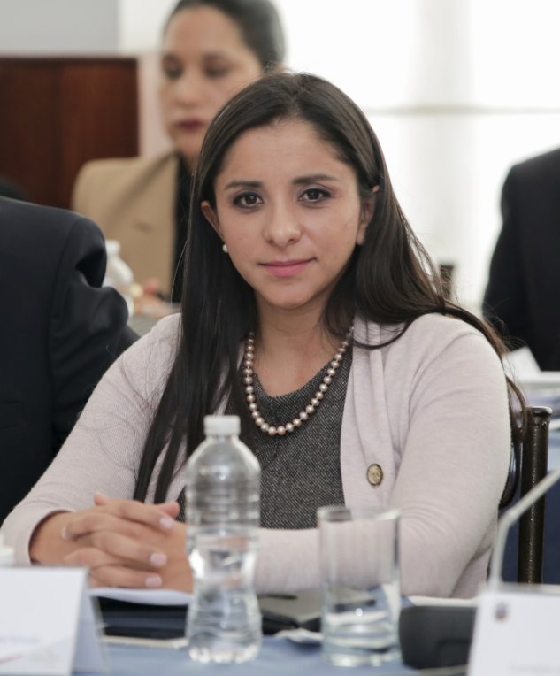 23 de octubre de 2017 - Sesión de la Comisión de Justicia Tema: Comisión de Justicia recibe a Diego García Carrión, procurador General del Estado, para que explique sobre las acciones legales que ha iniciado o iniciará en relación al caso de corrupción de la multinacional Odebrecht; y sobre la situación jurídica de los procesos penales con relación a las denuncias de los hechos de corrupción de Petroecuador y otros. Fotografía: Alberto Romo/Asamblea Nacional